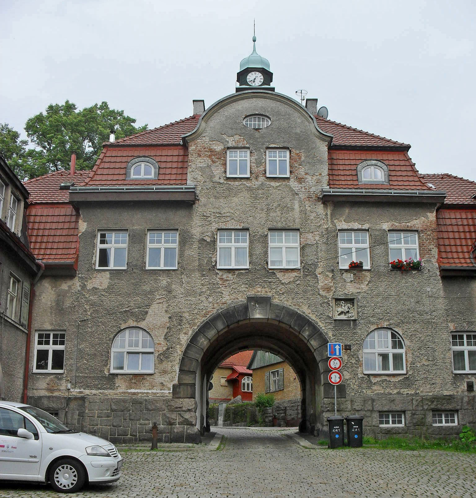 Liberec IV-Perštýn, nám. Pod Branou 440/4.